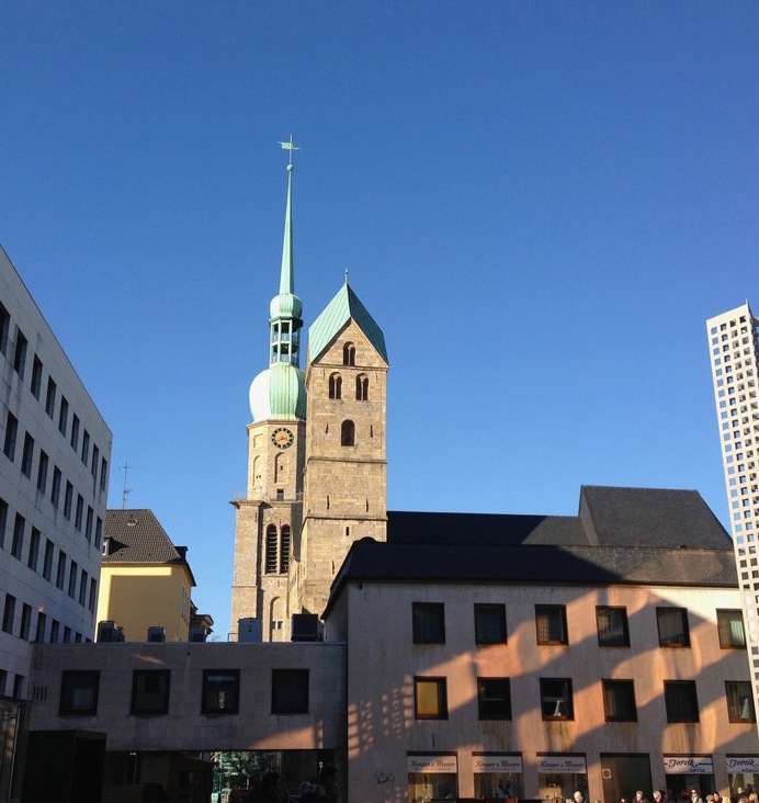 Marinekirchhof mit St.Reinoldi, St.Marien und evangelischen GemeindehausThis is a photograph of an architectural monument., no. 0968